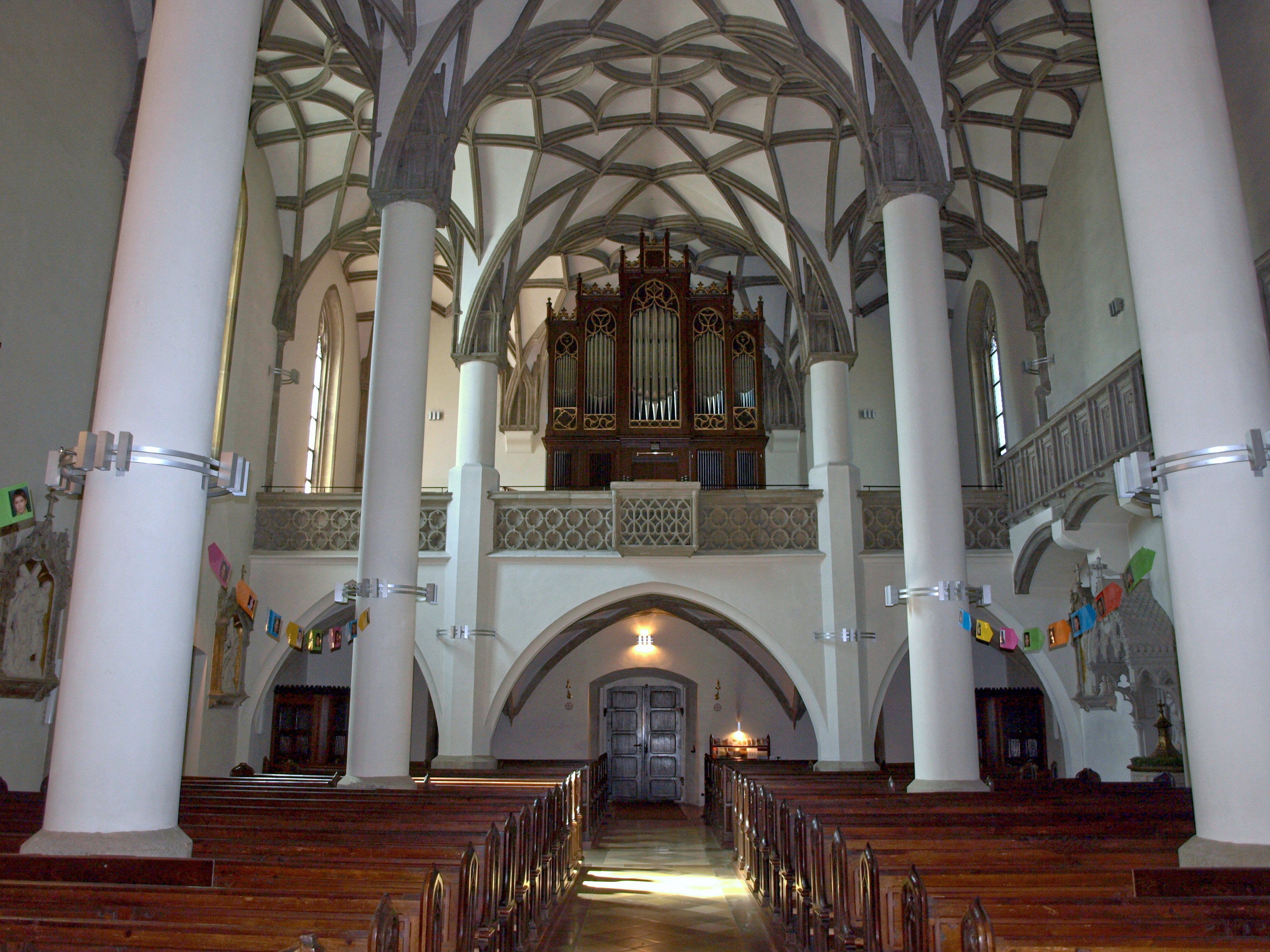 Kath. Pfarrkirche hl. Valentin